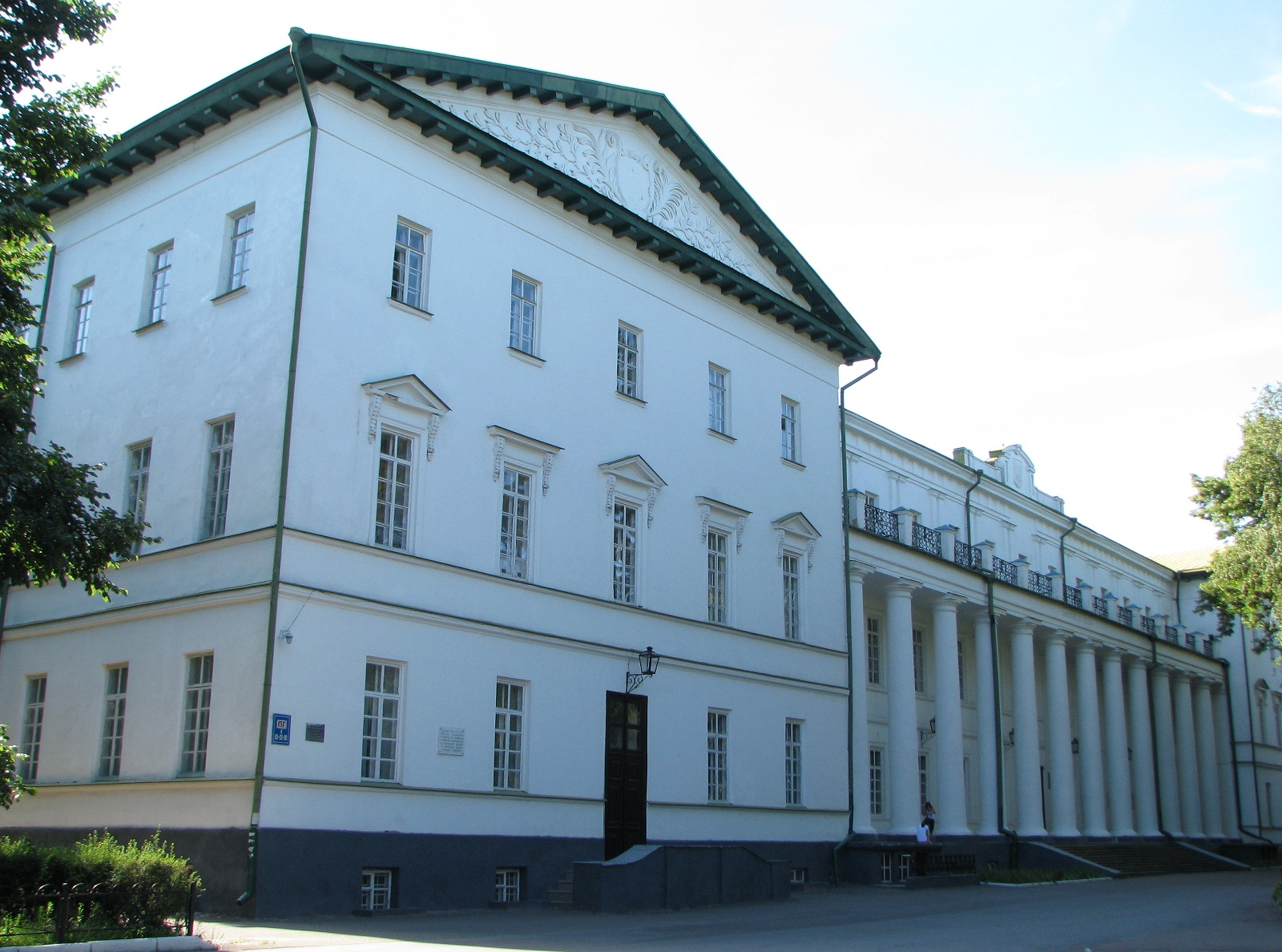 Ніжинський державний університет імені Миколи Гоголя